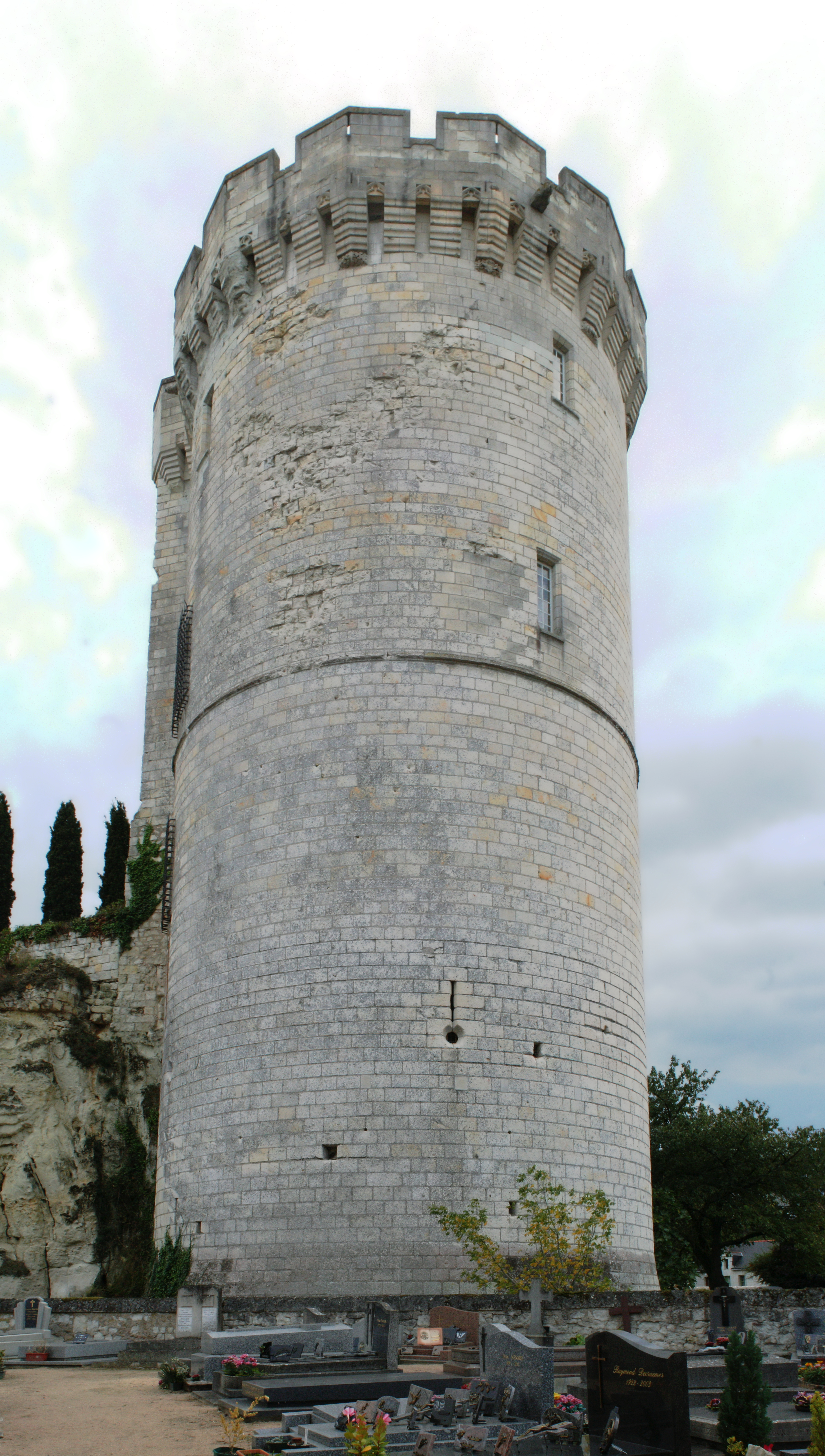 Tour de Trèves, commune de Chênehutte-Trèves-Cunault.